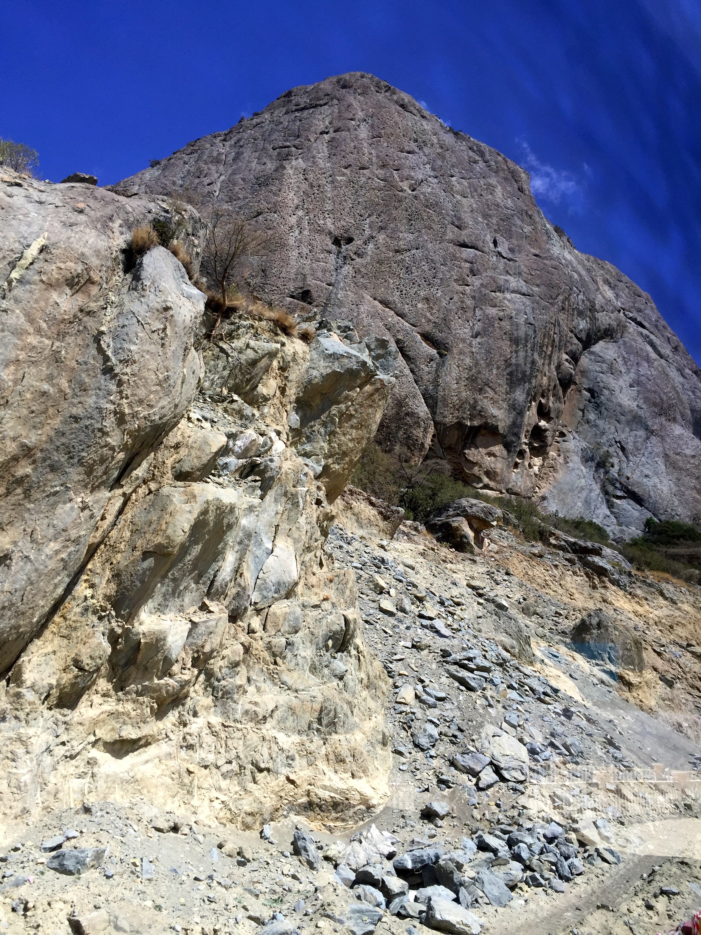 جبال منطثة عسير الصخرية